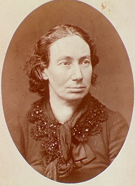 Photographie, portrait de Louise Michel